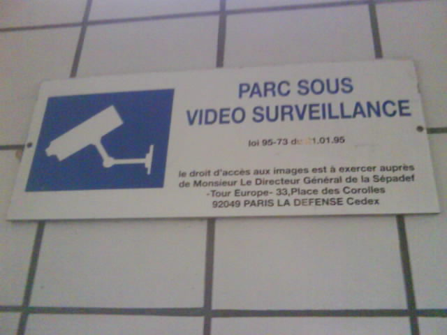 Panneau signalant un espace sous video surveillance a Courbevoie